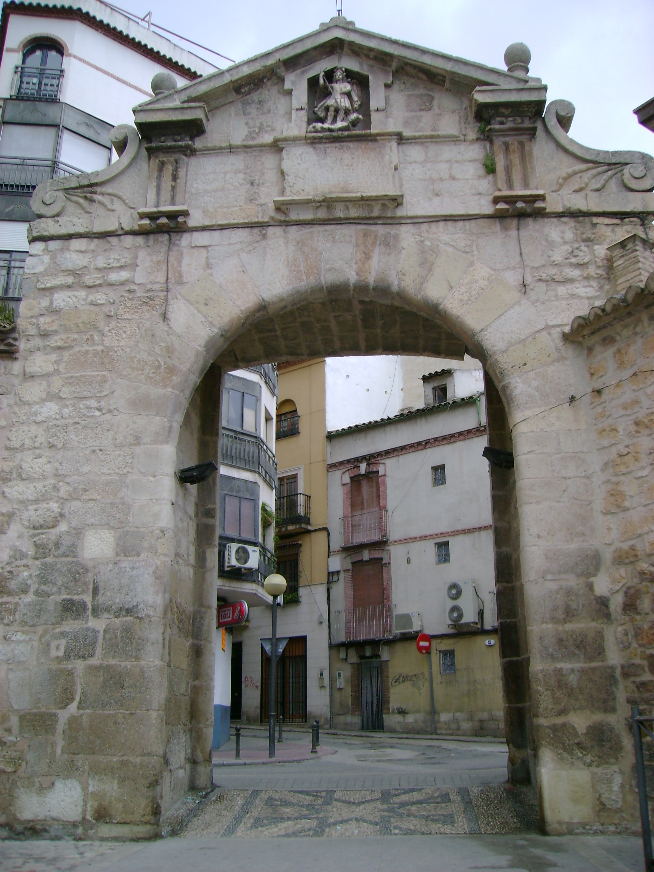 Puerta del Ángel, una de las puertas de la antigua muralla de Jaén.